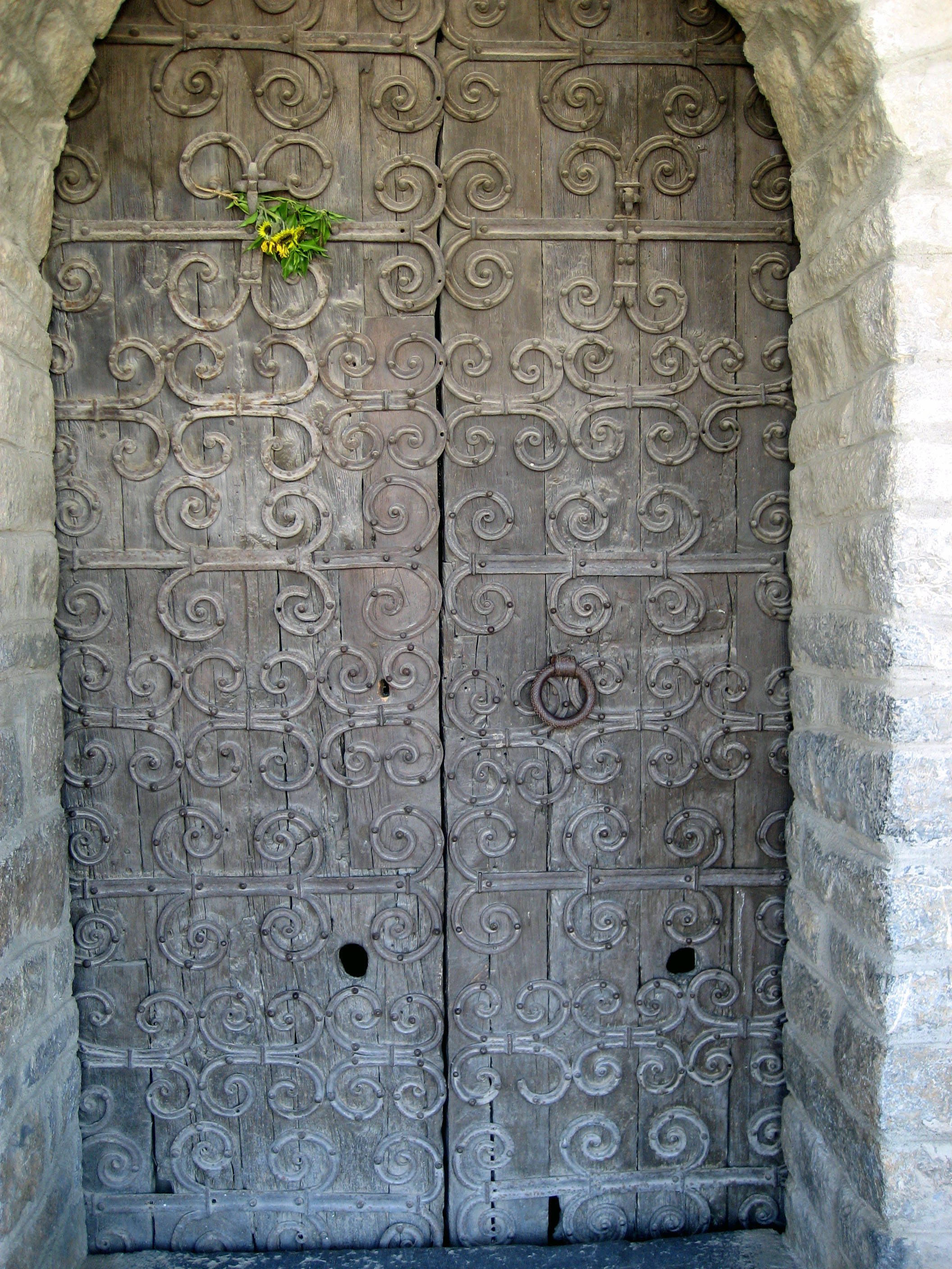 Cebuano: Porta amb ferramenta romànica de l'església de Santa Maria de Talló. Baixa Cerdanya. Catalunya